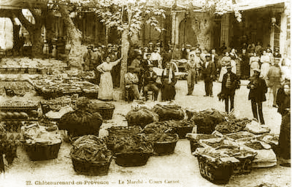 Marché du Cours Carnot à Châteaurenard créé après la première guere mondiale